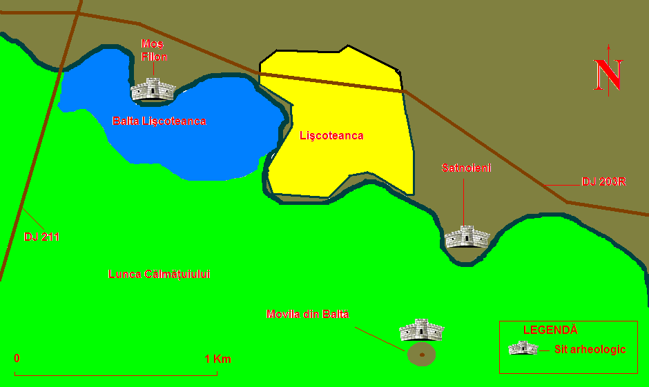 Imaginea cuprine localizarea situ-rilor istorice din comuna Bordei Verde. Harta este realizată în întregime de mine şi poate fi utilizată fără restricţii.